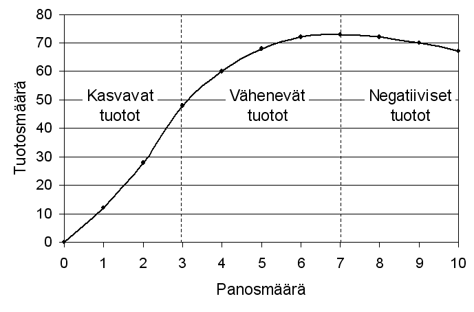 Tuotantofunktion graafinen kuvaus